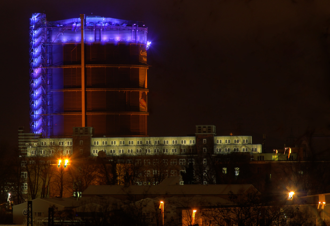 Gasometer Oberhausen mit dem Industriemuseum im Vordergrund